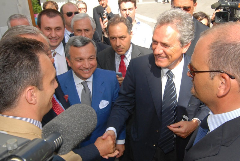 Trst 17-07-2007 - Gledalisce Verdi - Zveza industrijcev - DAN TURIZMA - Francesco Rutelli